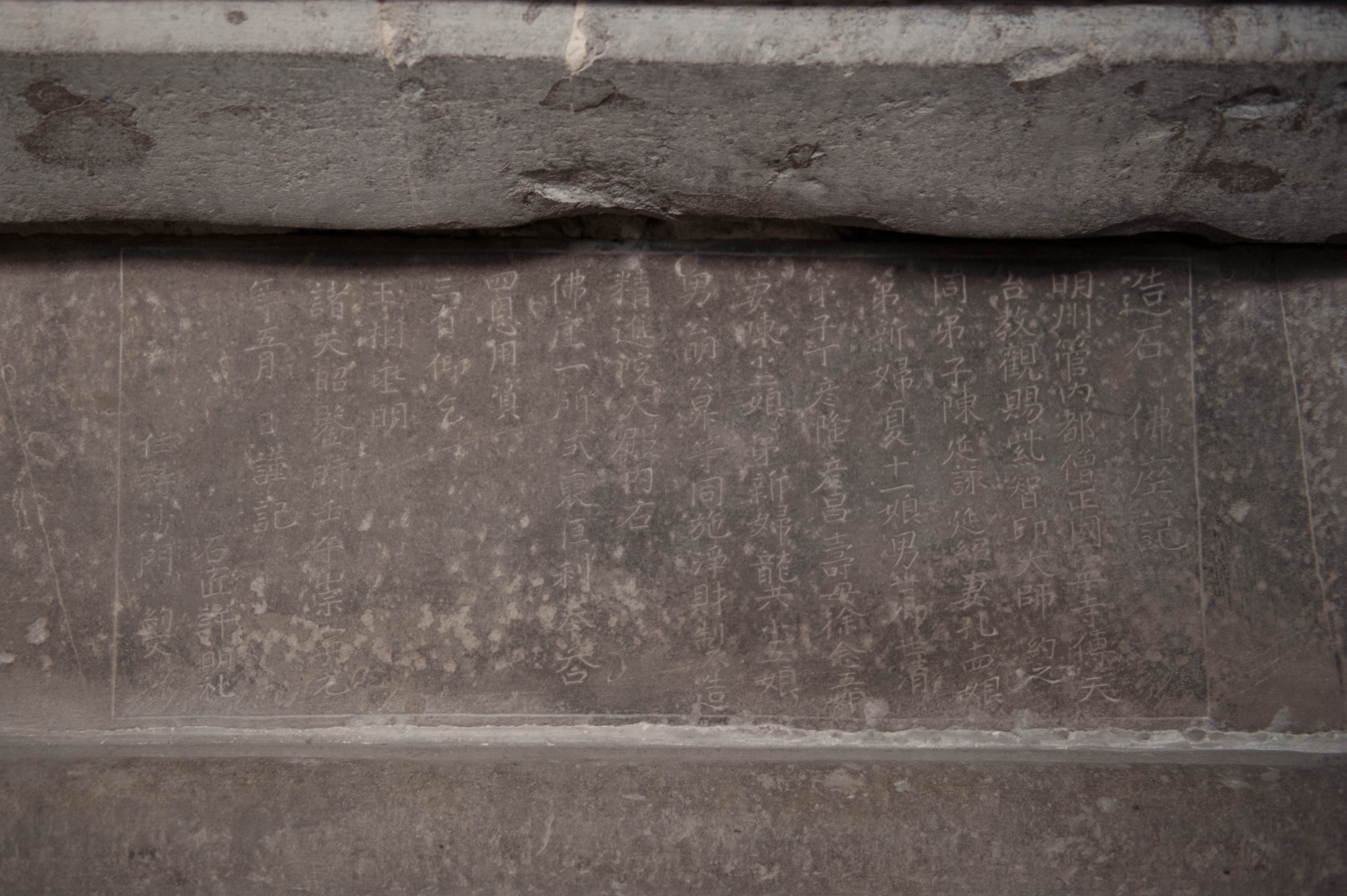 保国寺造石佛座记